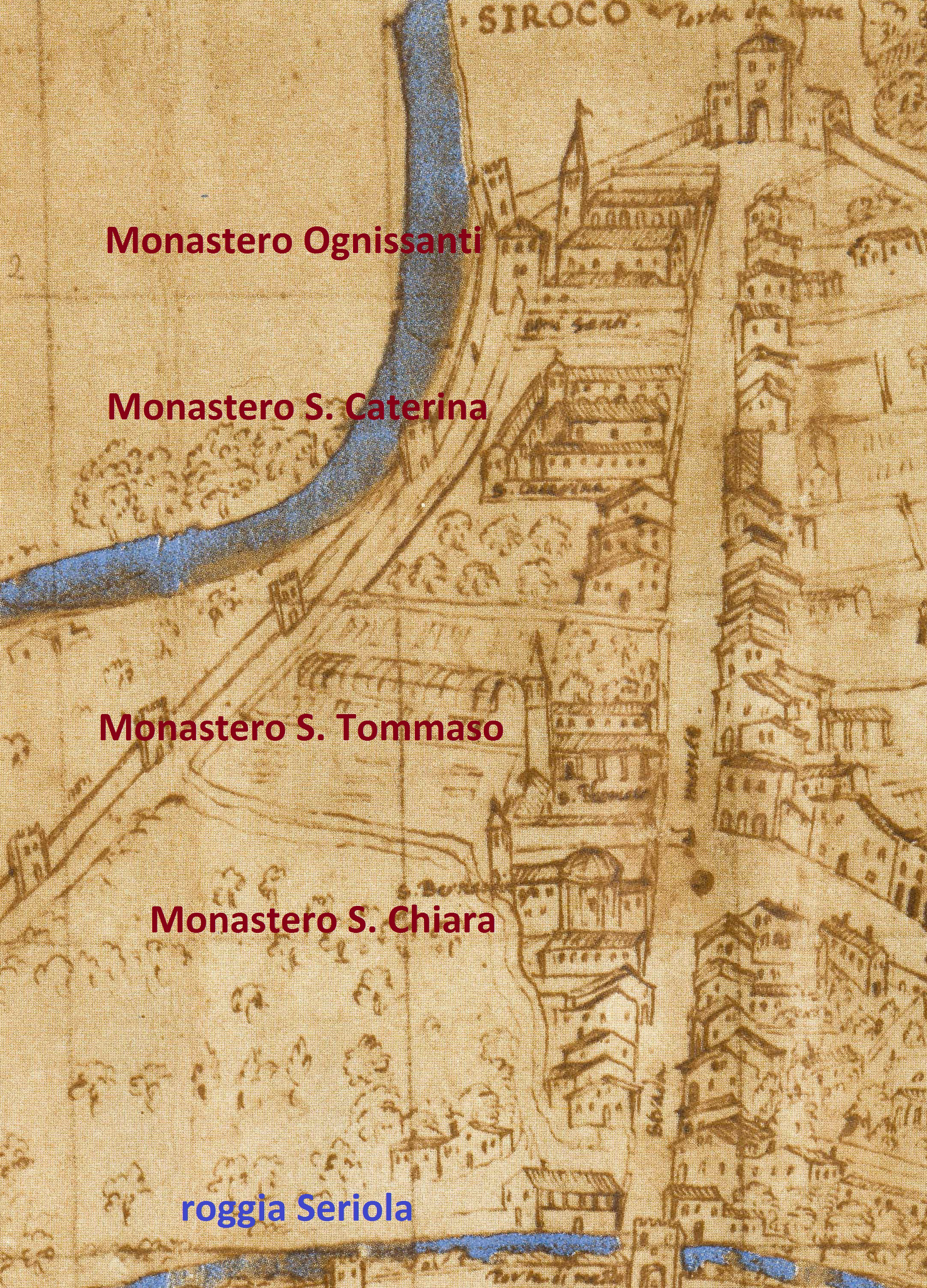 Vicenza - Pianta Angelica 1580 - particolare del Borgo Berga - Monasteri di contrà Ognissanti